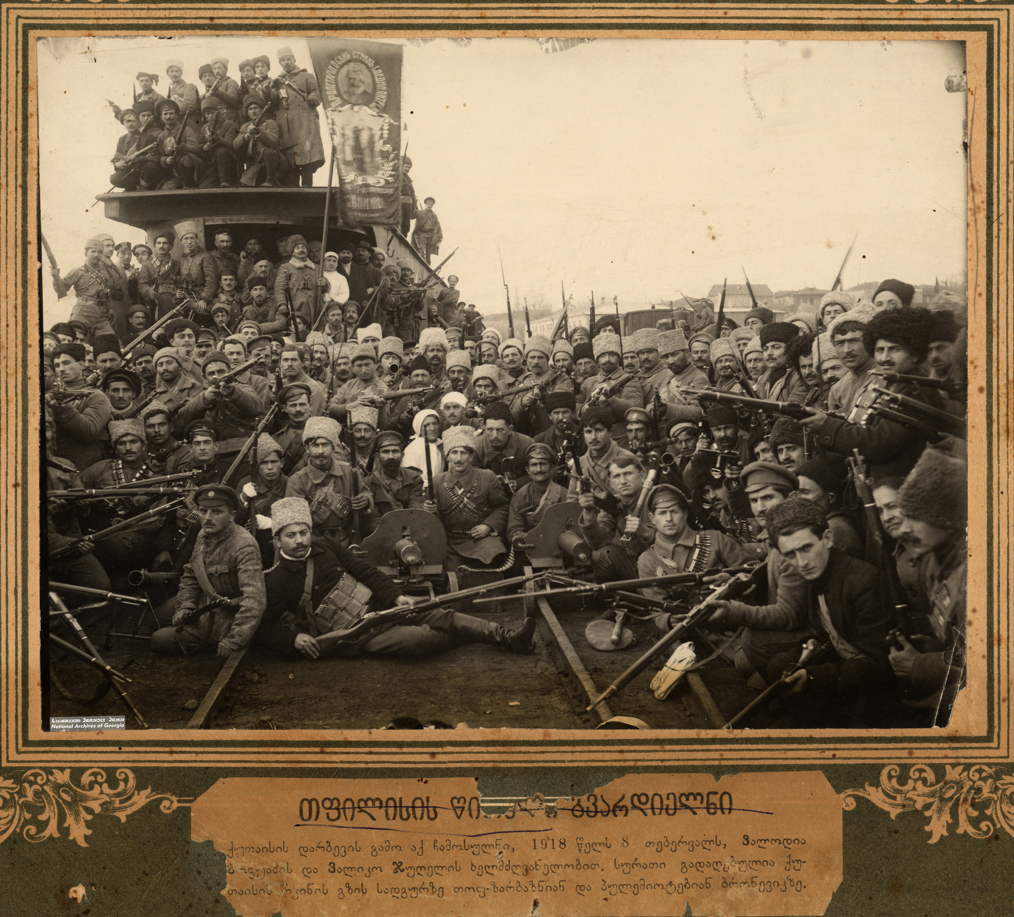 სახალხო გვარდიის რაზმი ქუთაისი პოლკის განიარაღების შემდეგ 1918 წ